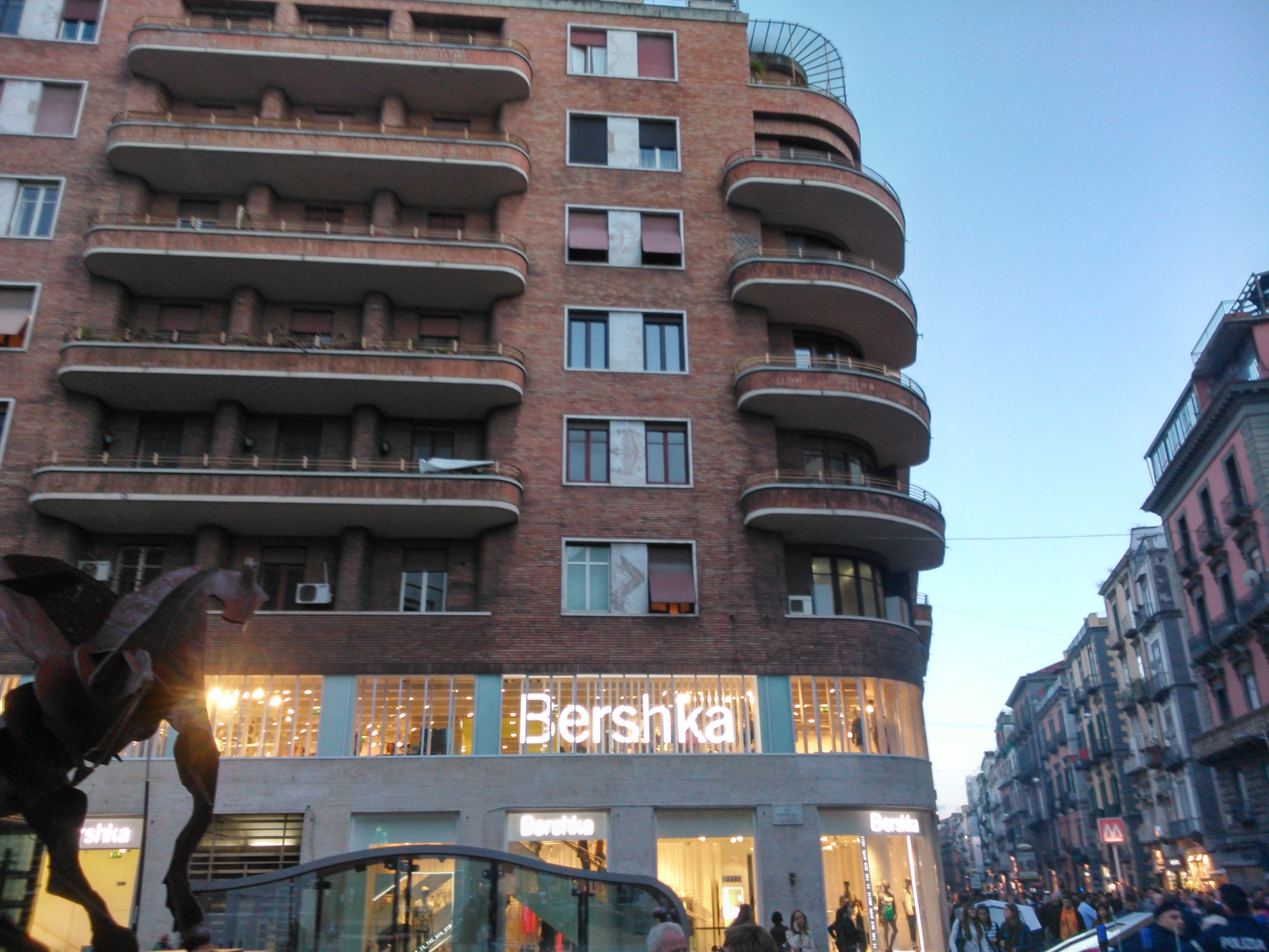 Bershka di fronte alla stazione Toledo